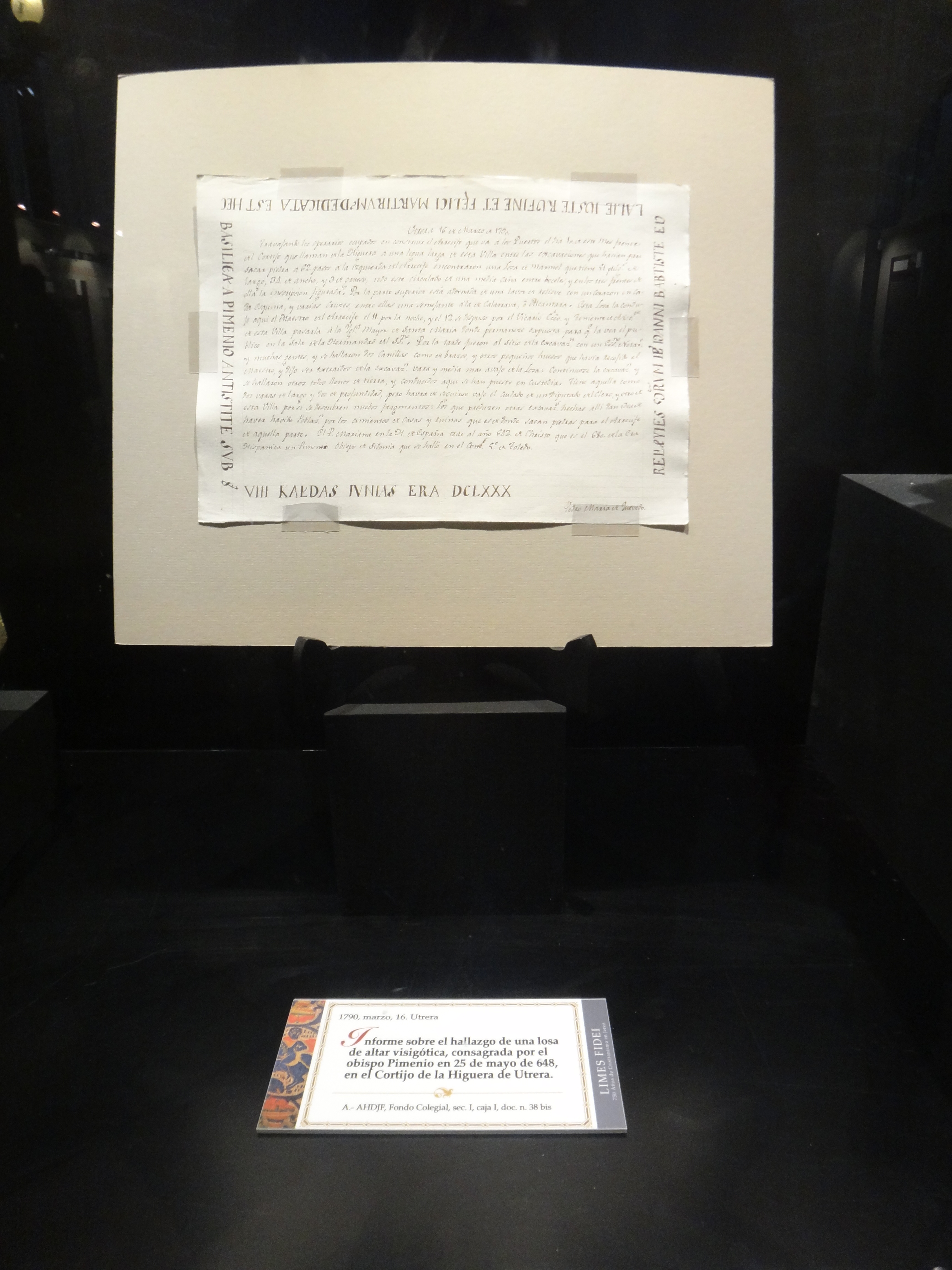 Exposición 'Limes Fidei. 750 años de cristianismo en Jerez' en la Catedral de Jerez de la Frontera